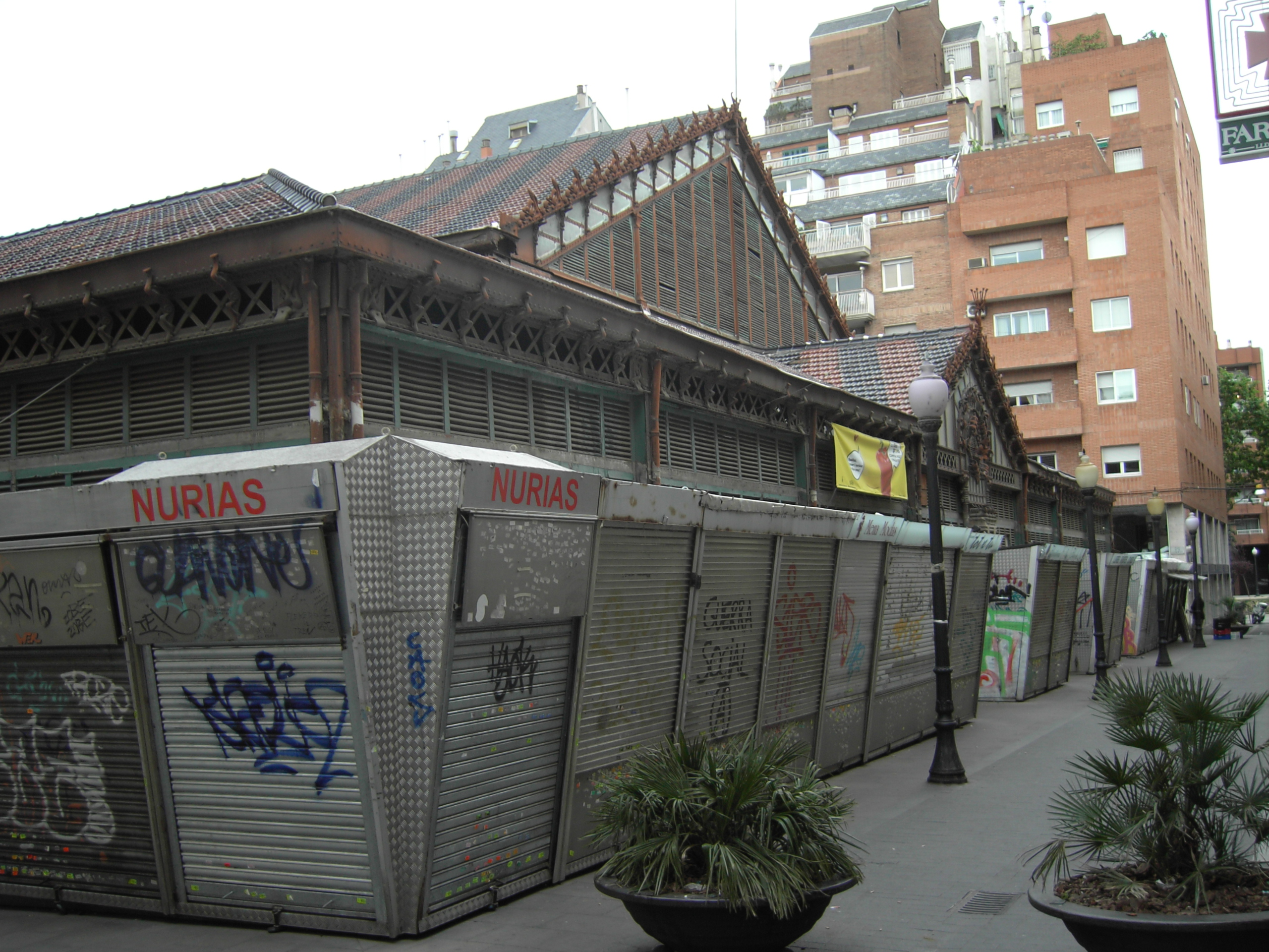 Mercat de la Llibertat (Freedom Garden) - Gràcia (Barcelona)